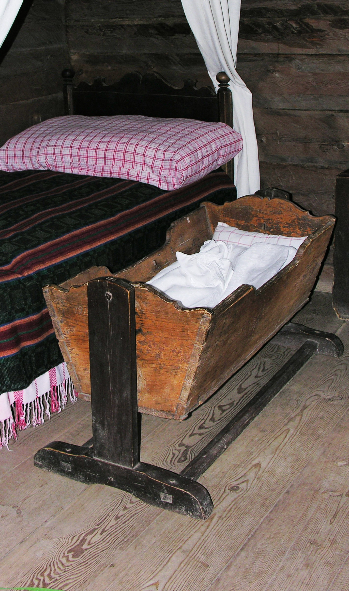 Bercelonnette (berceau), Lituanie